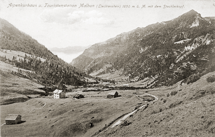 Postkarte mit «Alpenkurhaus u. Touristenstation Malbun (Liechtenstein) 1650 m ü. M. mit dem Stachlerkopf»